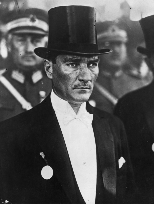 Reisicumhur Gazi Mustafa Kemal silindir şapka, frak ve İstiklâl Madalyası ile bir törende, 1925. Arka planda görülen paşalar arasında Ali Sait (Akbaytogan) bulunmaktadır.